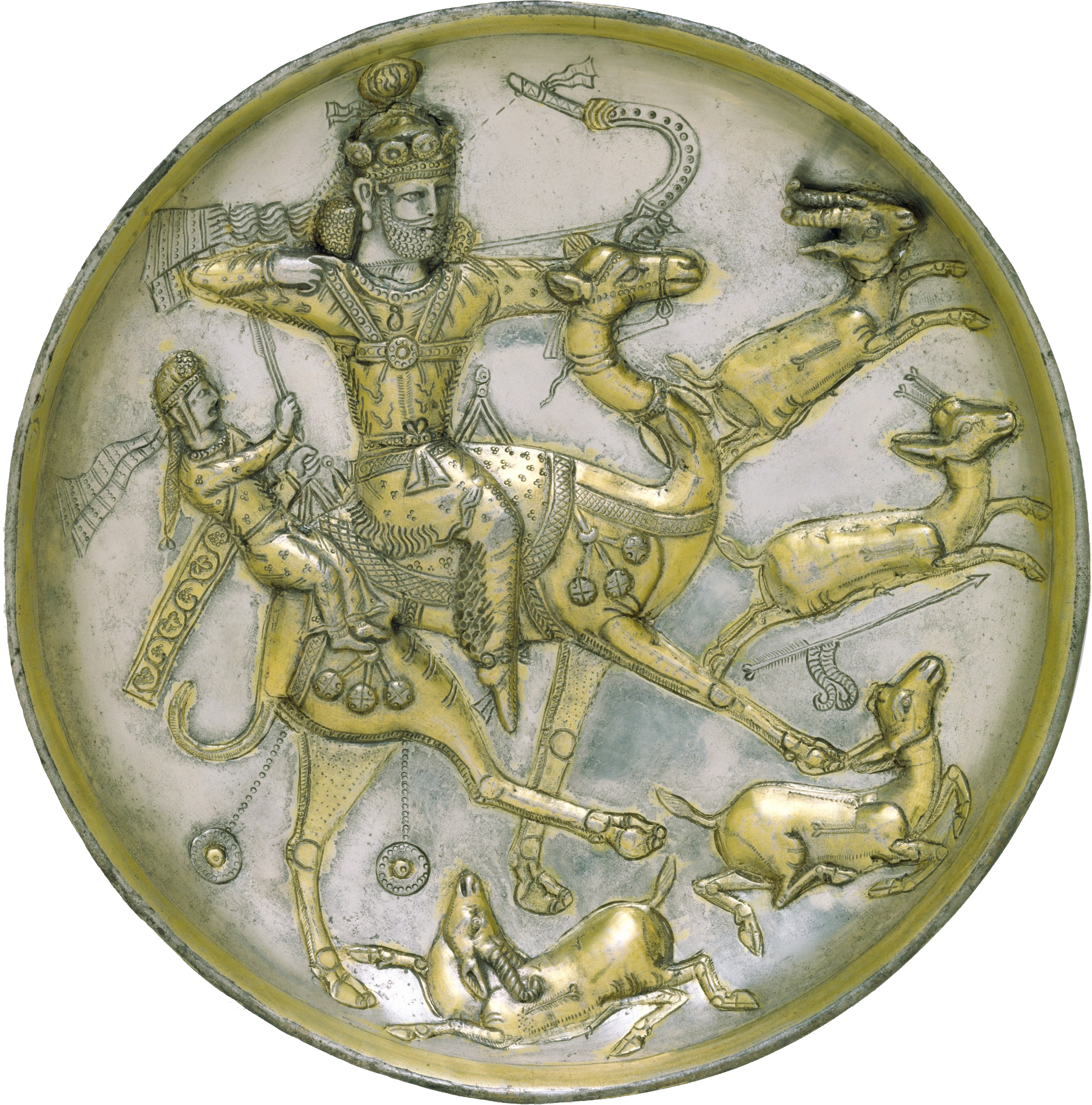 Sasanian; Plate; Metalwork-Vessels-Inscribed